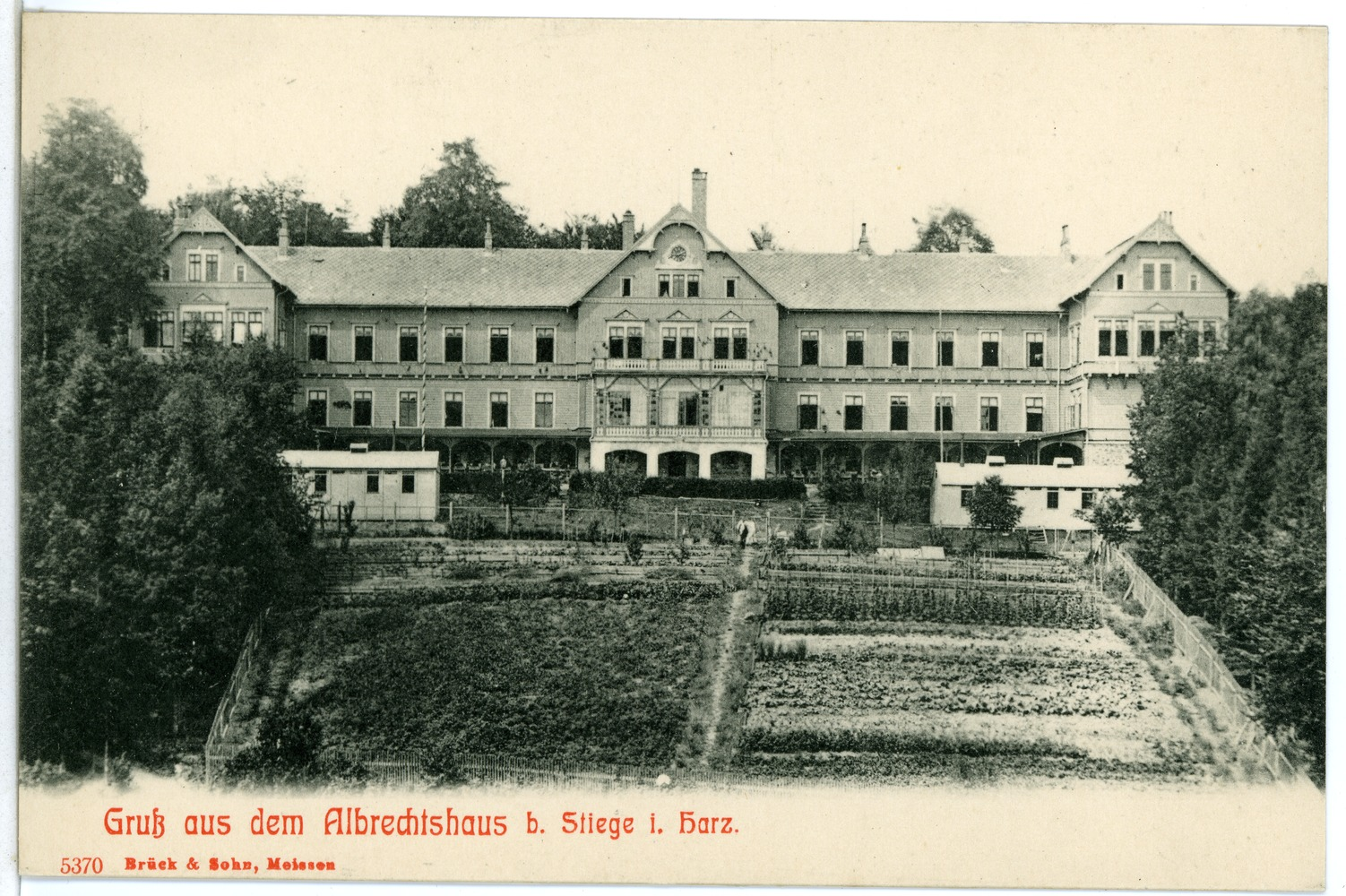 Stiege/Harz; Albrechtshaus This postcard is from publisher Brück & Sohn in Meißen ( postcard has a unique number 05370 and is available in a higher resolution at the publisher. This images was uploaded in a cooperation project between Wikipedians and the publisher.